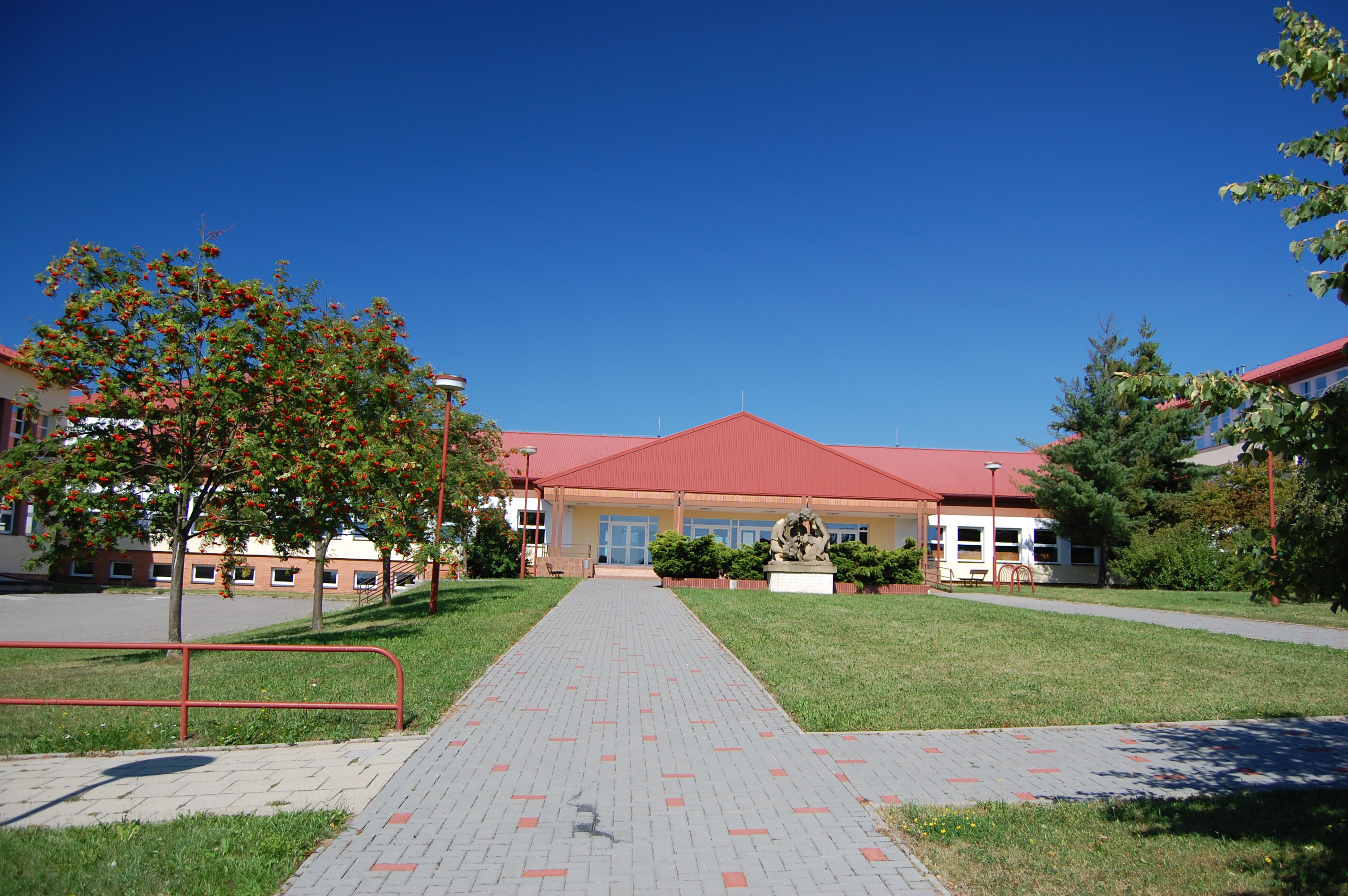 Základní škola a gymnázium - vchod, Konice, okres Prostějov